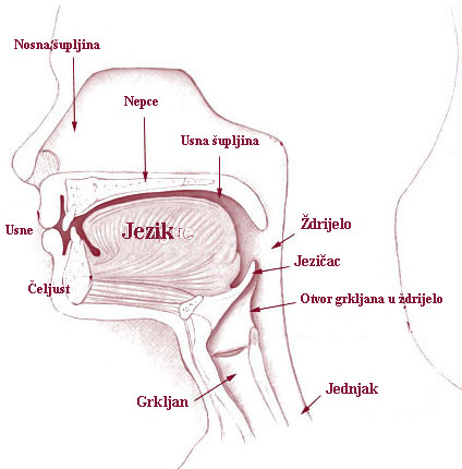 Pregled glave i vrata.